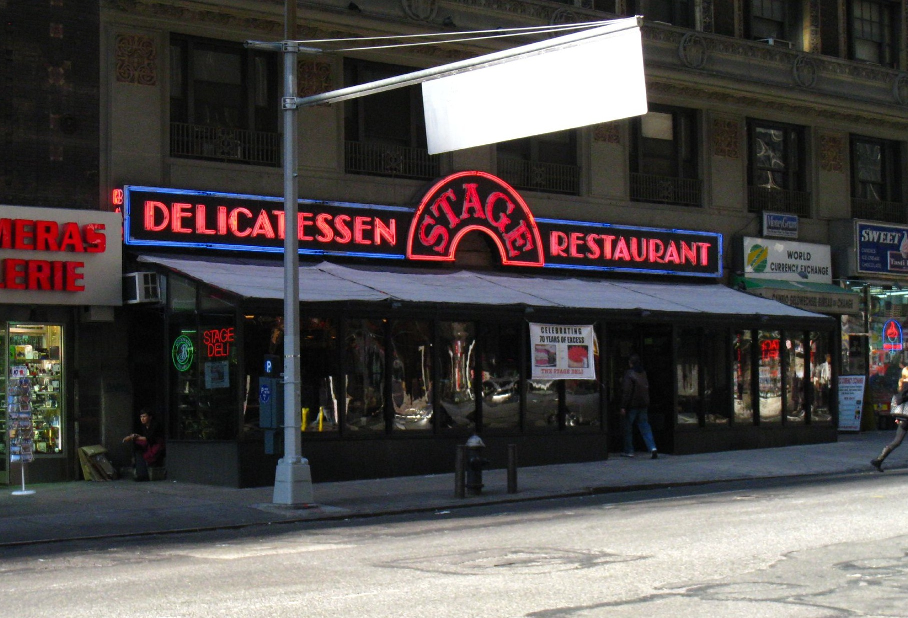 Stage Deli, 2007.